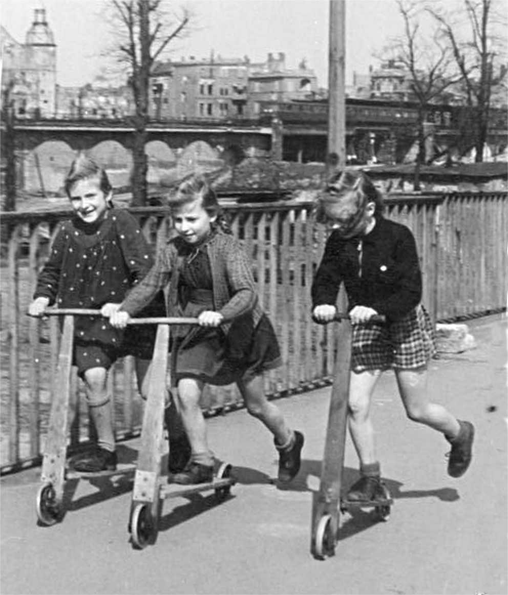 Berlin, Kinder mit Roller ADN/Illus Berlin 28.3.1948 Start in den Frühling